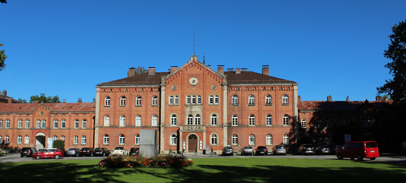 Palais im Stadtpark von 1863 bis 1868 als "Kreisirrenanstalt" in Deggendorf errichtet. Ab 1933/34 (klammheimlich, weil laut dem 1919 unterzeichneten Friedensvertrag von Versailles untersagt,) Wehrmachtskaserne und (ab 1941) zusätzlich Unteroffiziers-Vorschule. 1945 kurzzeitig Unterkunft für zahlreiche osteuropäische Flüchtlinge und einige Söldner der nun erneut vernichtend geschlagenen Deutschen, dann für ausgesiedelte, geflohene oder vertriebene Deutsche. Schließlich bis 1949 DP-Camp 7 Deggendorf für heimatlose Menschen und für jüdische Überlebende der KZ Theresienstadt, Auschwitz, Flossenbürg und für polnische Juden, die den Nachkriegspogromen in ihrer Heimat entflohen. 1949/50 Wohnanlage für deutsche Flüchtlinge und heute Arzt- , Selbsthilfe-, Therapie- und Kommunikationszentrum. Nur wenige Bauwerke in Bayern haben eine ähnlich dramatisch-tragische Historie.This is a photograph of an architectural monument.